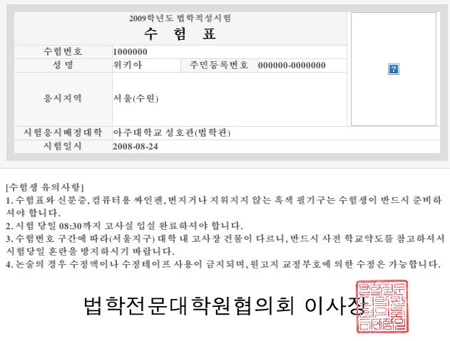 2008년 8월 24일 실시되는 법학전문대학원협의회 주관 법학적성시험 수험표